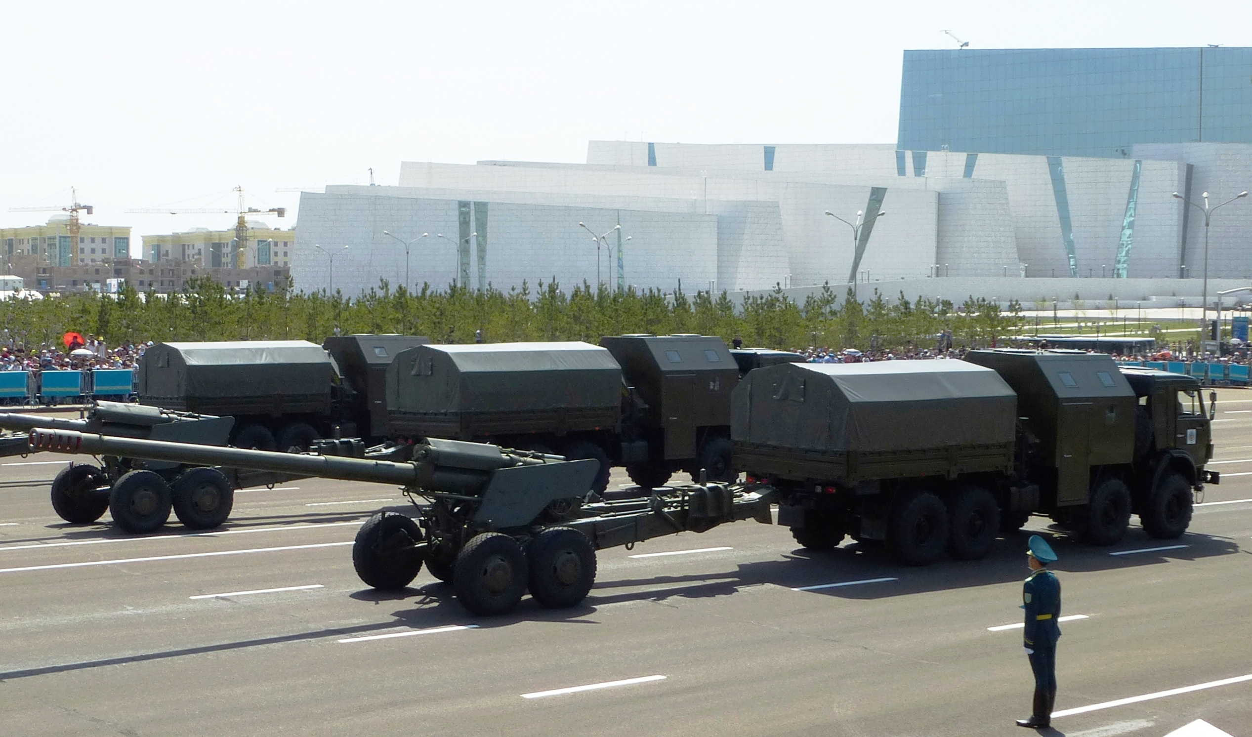 2А36 с тягачом оборудованным обитаемым бронированным модулем, на базе Камаз-6350 на военном параде в Нур-Султан 7 мая 2015 года